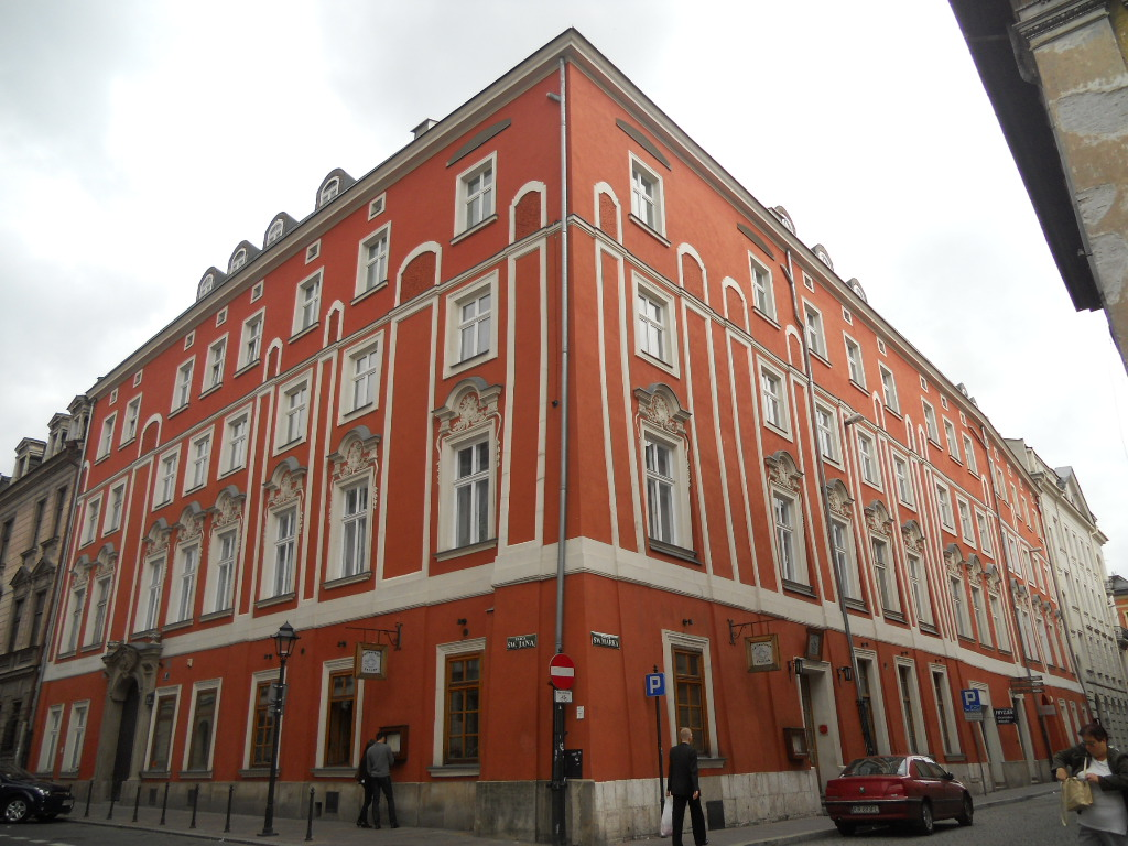 Kamienica przy ulicy św. Jana 13 w Krakowie.